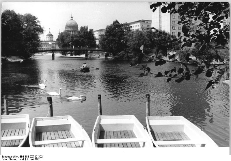 Für Bezieher des ADN-Reportagendienstes! Zum Beitrag: Gartenkleinod zwischen Havelarmen - Im Pflanzenparadies auf der Potsdamer Freundschaftsinsel. ADN-ZB-Sturm-2.7.81-bb- Ruderbote laden auf der Potsdamer Freundschaftsinsel zur idyllischen Spazierfahrt auf der Havel ein. Im Hintergrund die Kuppel der Nikolaikirche und der kleine Turm des Kulturhauses "Hans Marchwitza" (Bitte beachten Sie hierzu auch Z0702-300n, 301n, 303n und 304n!)"